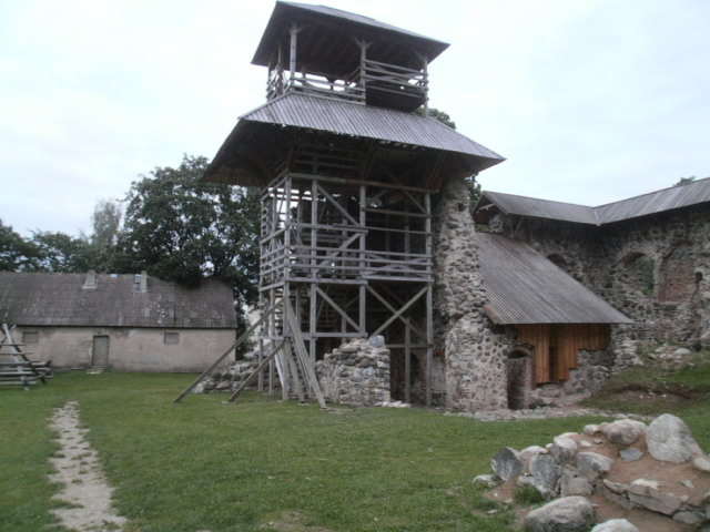 Konvendihoone peatornile ehitatud vaateplatvorm.